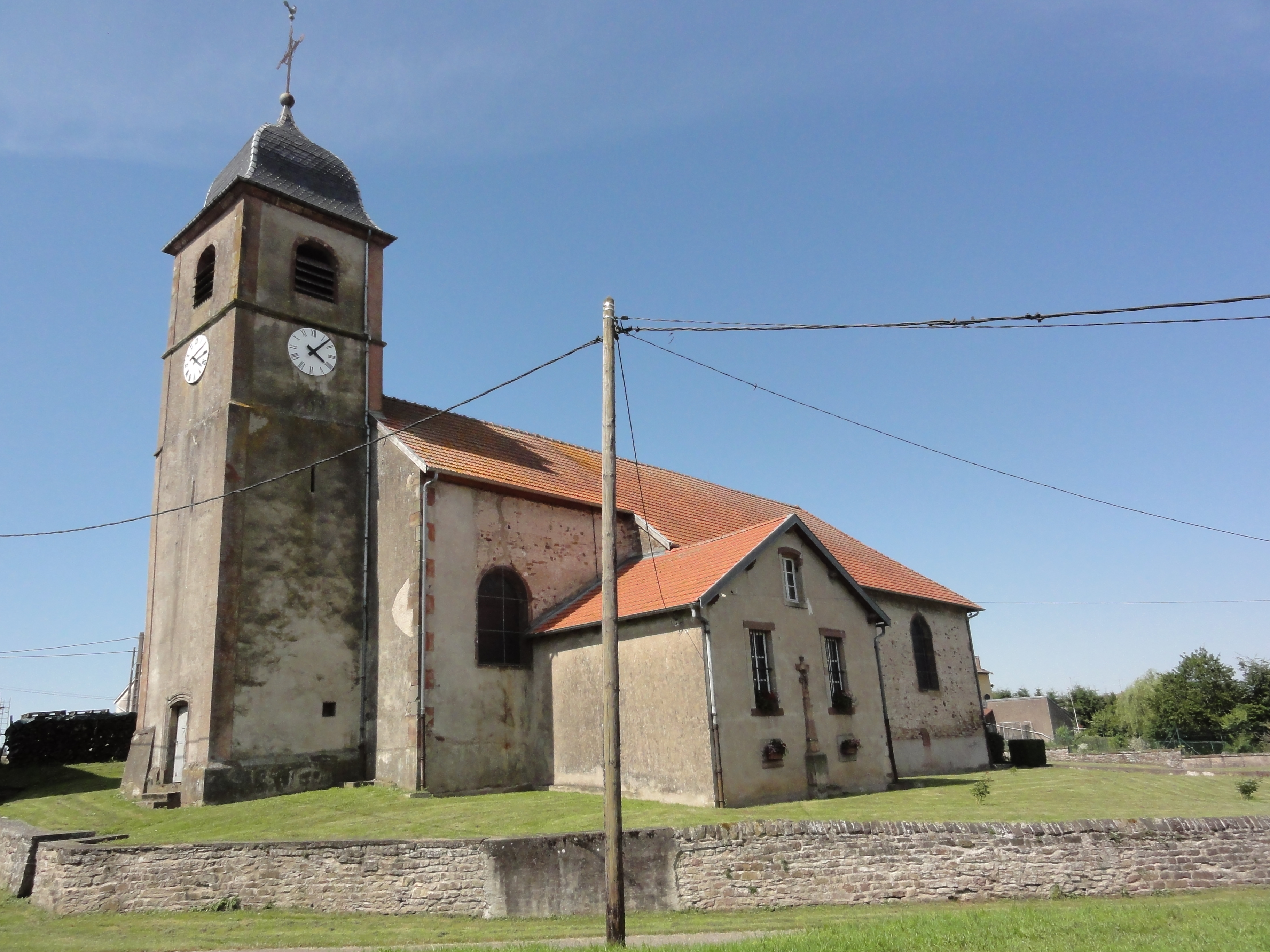 Merviller (M-et-M) église